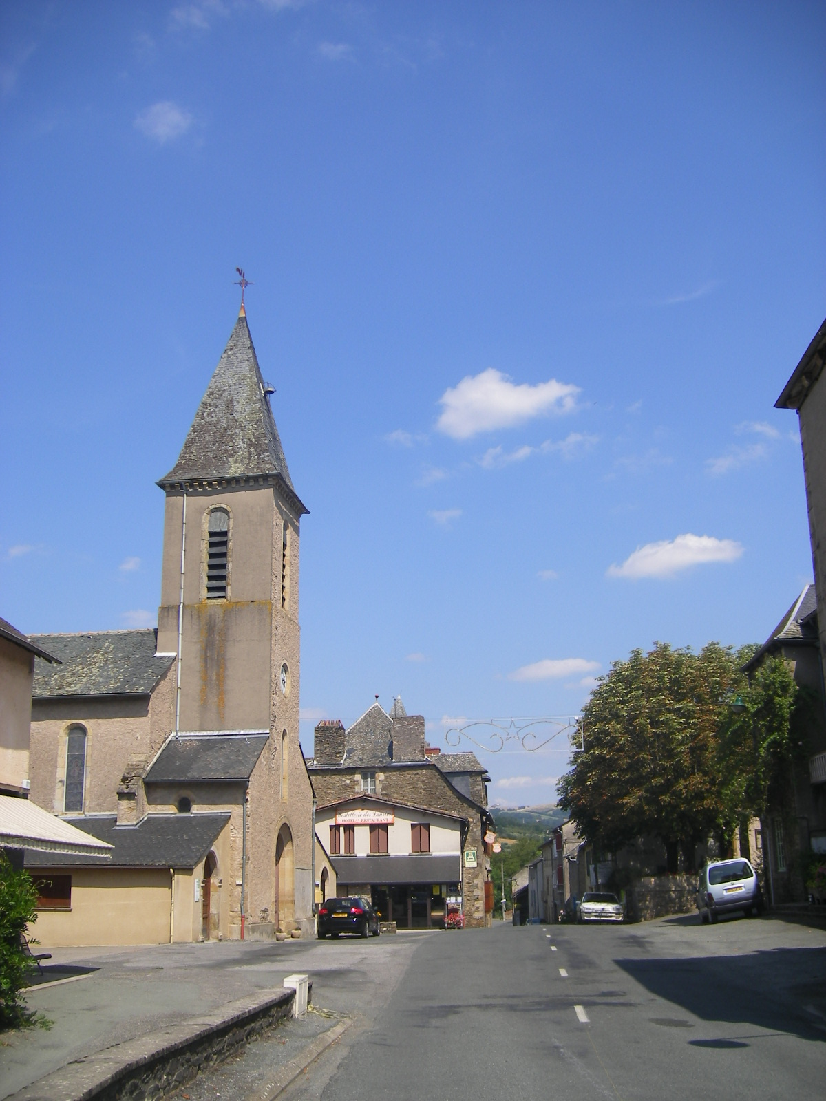 Trébas